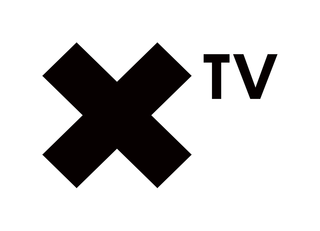 Logo XTV